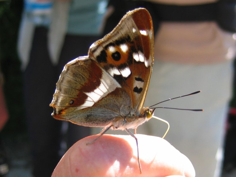 Großer Schillerfalter Apatura iris, Müritz-Gebiet